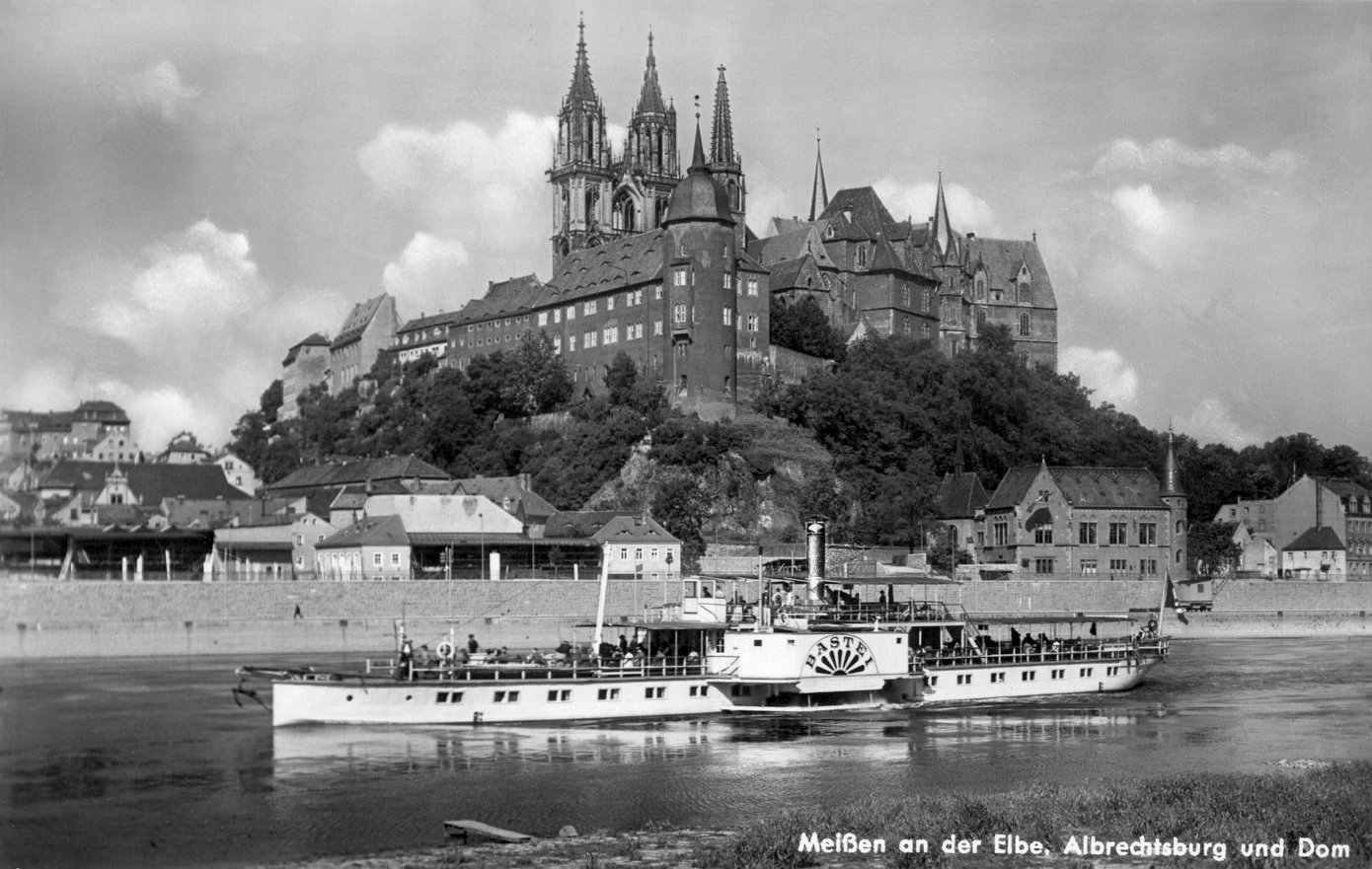 Meißen; Albrechtsburg und Dom - Elbe mit Dampfer Bastei This postcard is from publisher Brück & Sohn in Meißen ( postcard has a unique number 27596 and is available in a higher resolution at the publisher. This images was uploaded in a cooperation project between Wikipedians and the publisher.